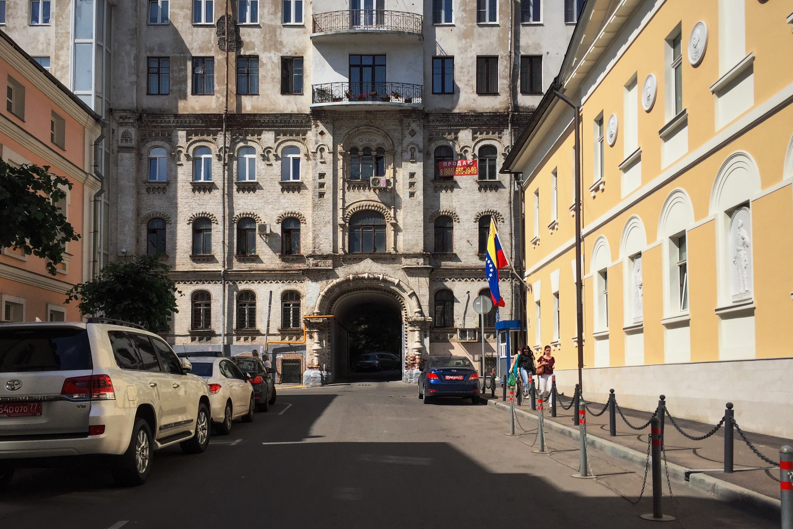 2-й Троицкий переулок. Впереди дом 6 1915 года, справа дом 4 - посольство Венесуэлы